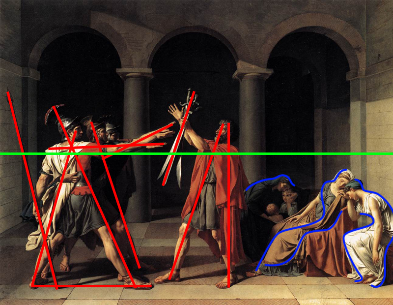 Schéma créé pour l'article "Le Serment des Horaces", octobre 2008.